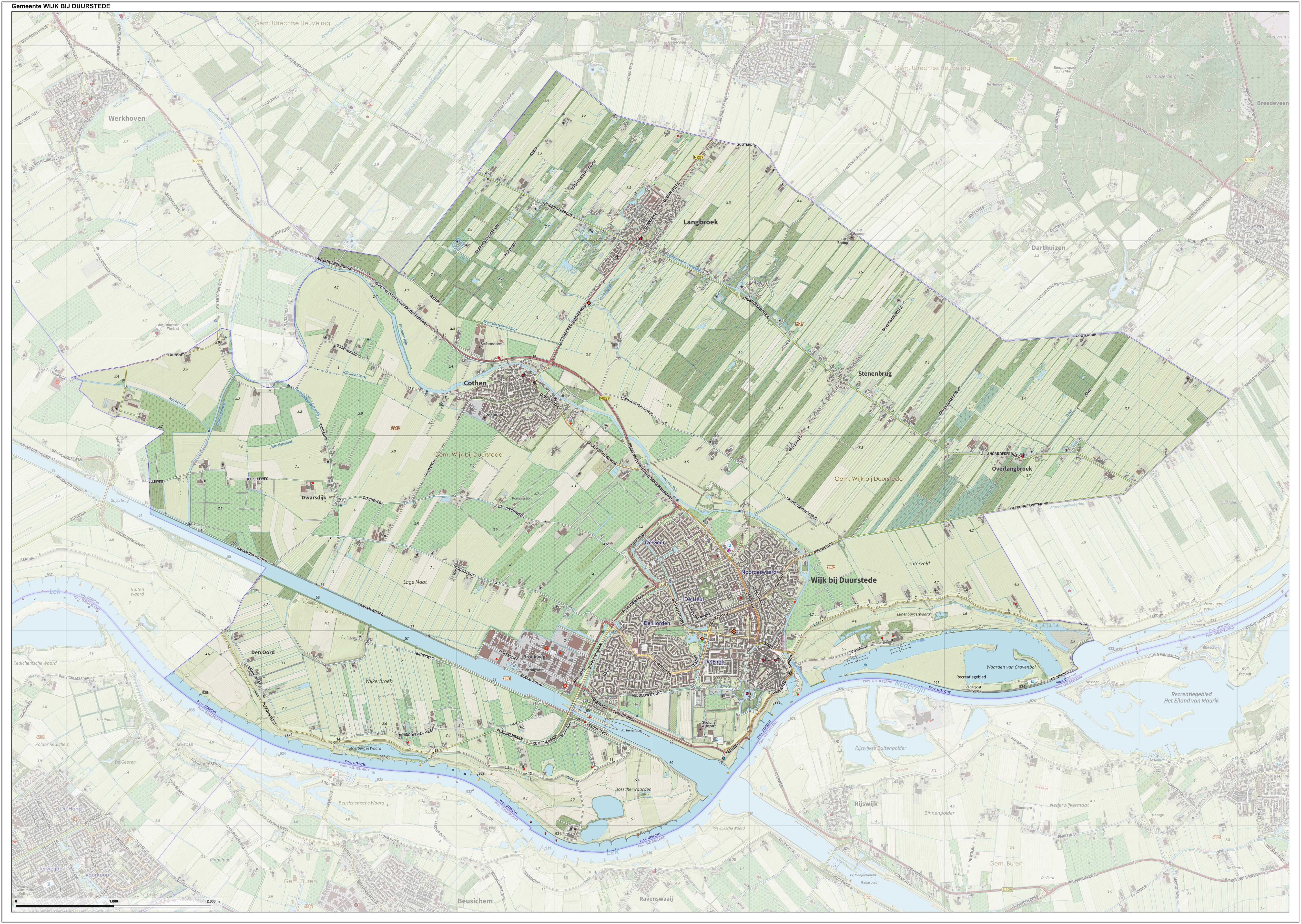 Topografische gemeentekaart. Resolutie: 400 pixels/km. Kaartbeeld samengesteld uit de open geodata van de Top10NL en Top25namen (Kadaster), Creative Commons-BY licentie. Gebouwvlakken uit open geodata BAG extract. Wegen uit de OpenStreetMap, OpenStreetMap community. Reliëfschaduw uit de Actuele Hoogtekaart AHN2. Samenstelling en kleurenschema: Jan-Willem van Aalst, met QGIS. Zie ook de Legenda.